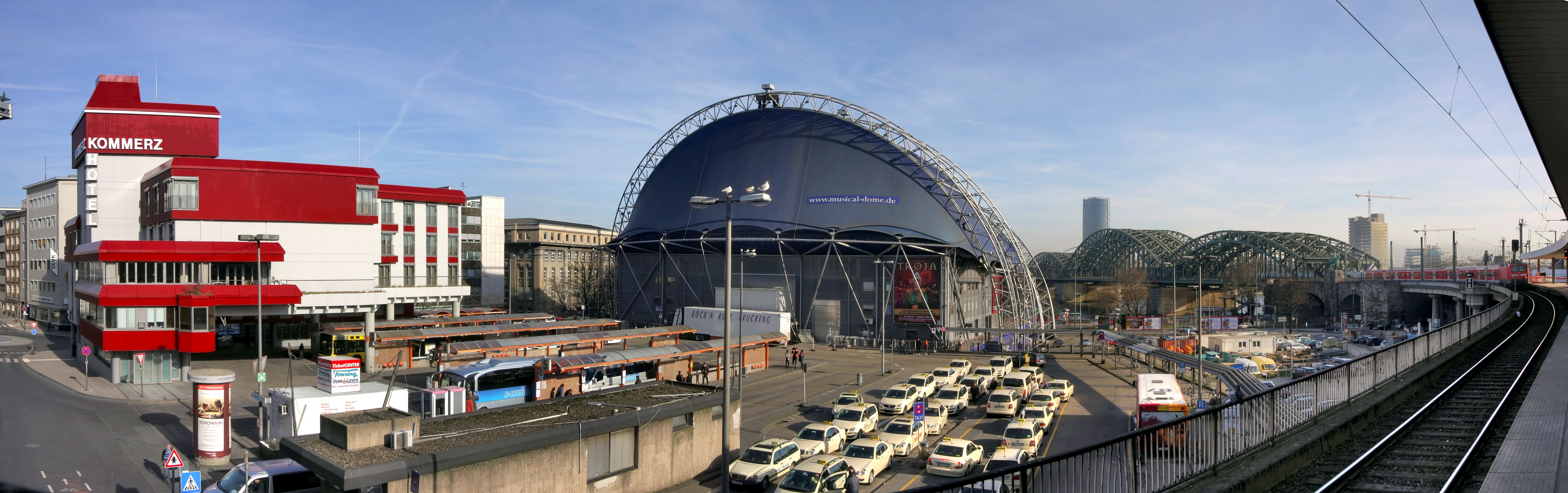 Köln, nordöstlich vom Hauptbahnhof: der Breslauer Platz mit dem Kommerz-Hotel, Busbahnhof, Musical Dome. Rechts im Hintergrund: Hohenzollernbrücke